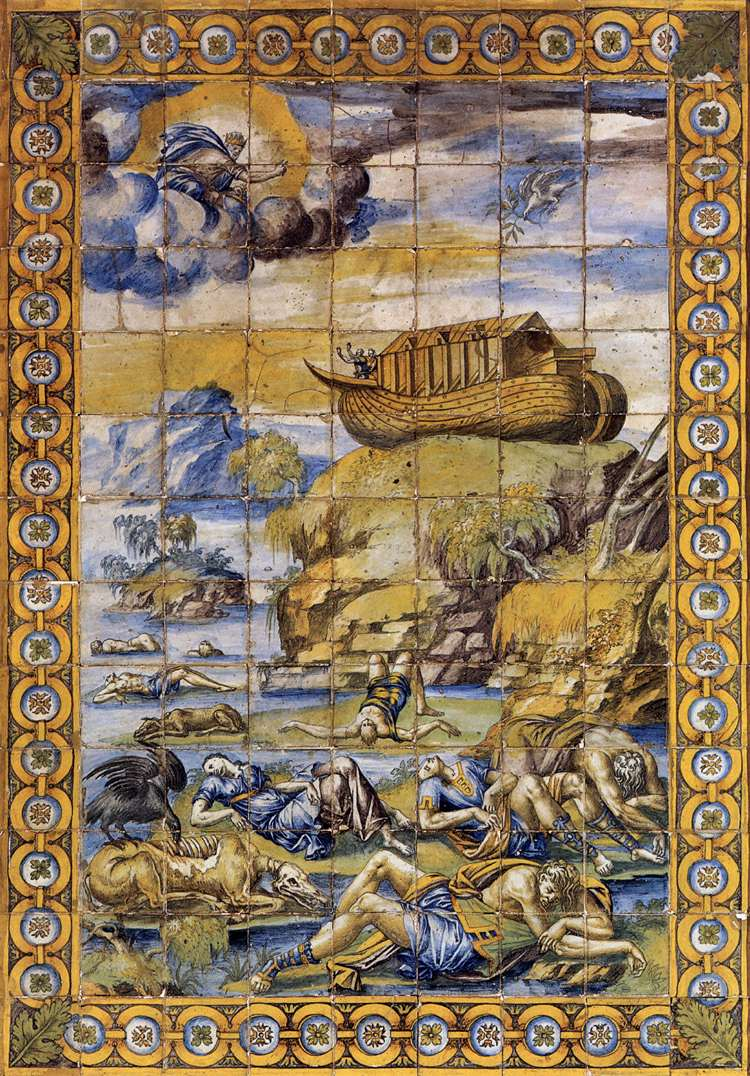 Histoire du déluge : arrivée au Mont Ararat de Masséot Abaquesne, 1550. Il s'agit d'une faïence, ici l'un des trois panneaux exposé au Musée national de la Renaissance d'Ecouen.